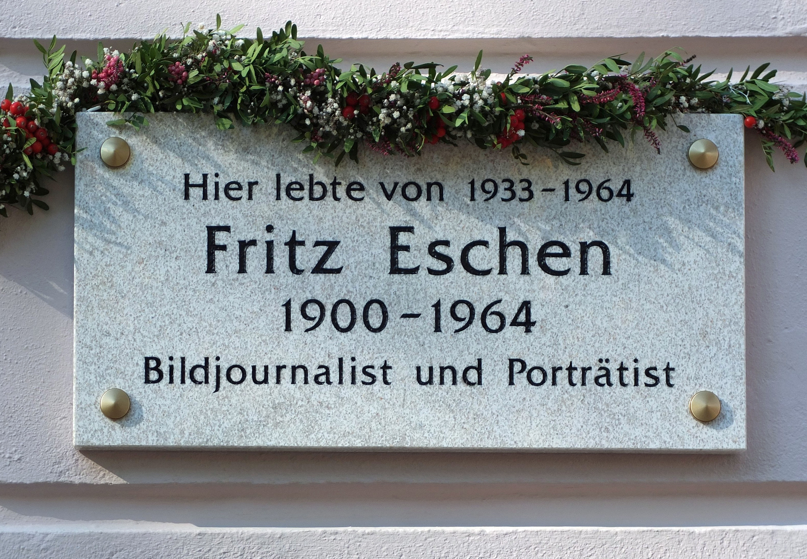 Gedenktafel für Fritz Eschen am Haus Bundesplatz 1 in Berlin-Wilmersdorf am Tag der feierlichen Enthüllung (11. Oktober 2015).